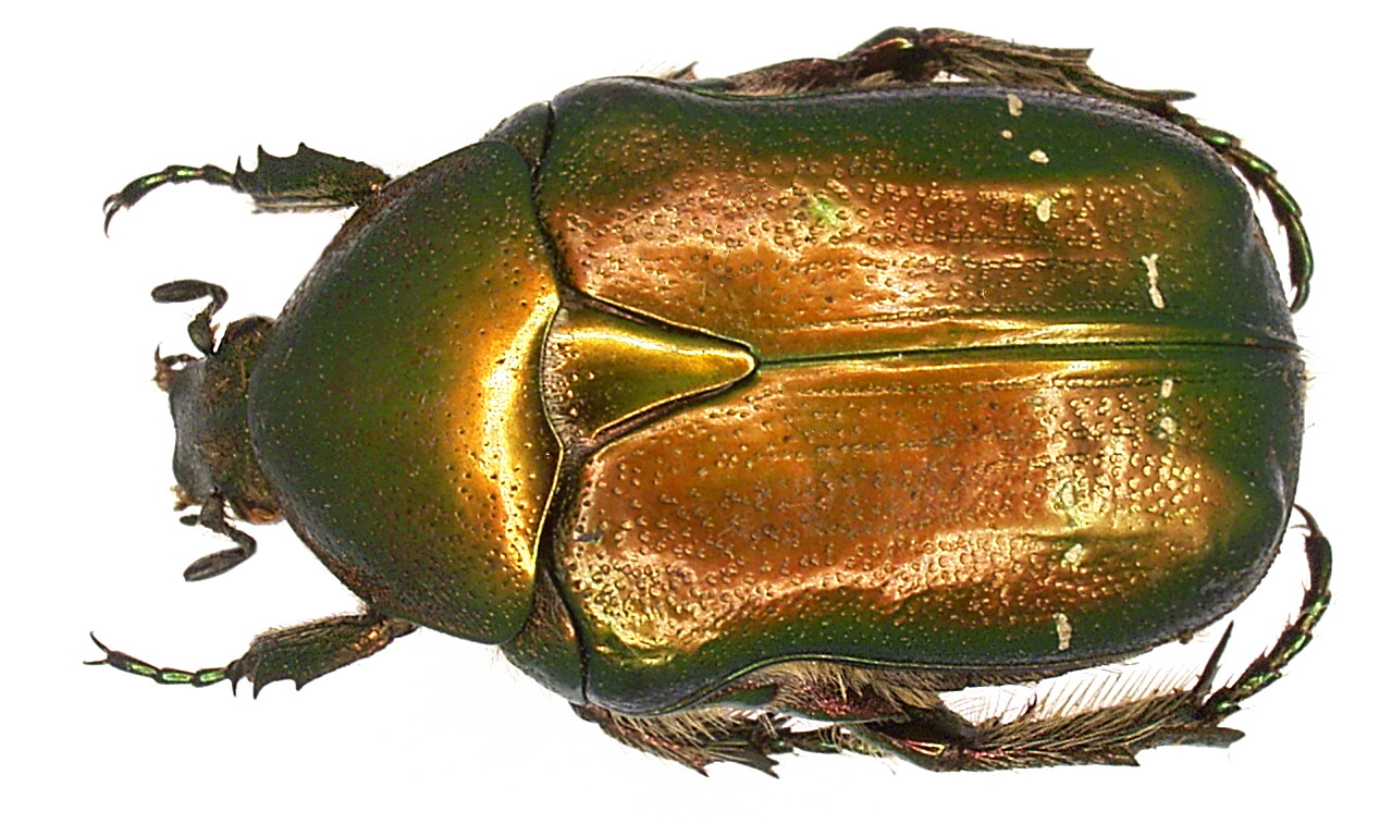 Familie: Scarabaeidae Grösse: 14-20 mm Verbreitung: ganz Europa ohne Iberische Halbinsel Ökologie: Entwicklung im morschen Holz von Laubbäumen und in Humuserde Fundort: Korsika leg. det. U.Schmidt, 1973 Foto: U.Schmidt, 2006